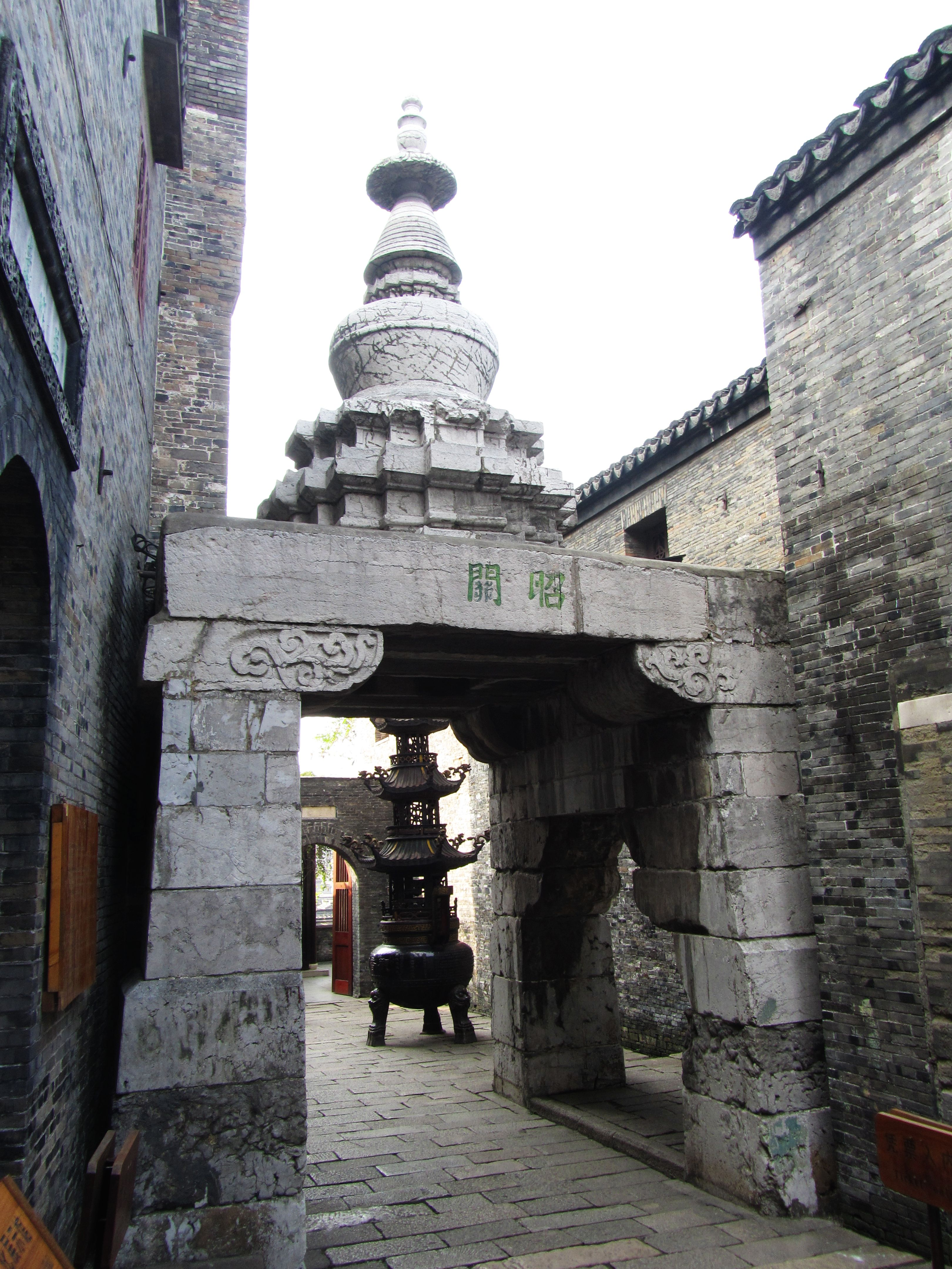 镇江昭关石塔。